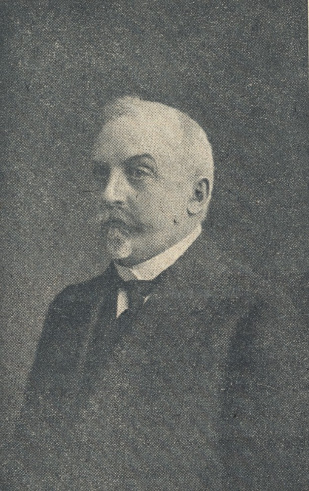 Hjalmar Schildt